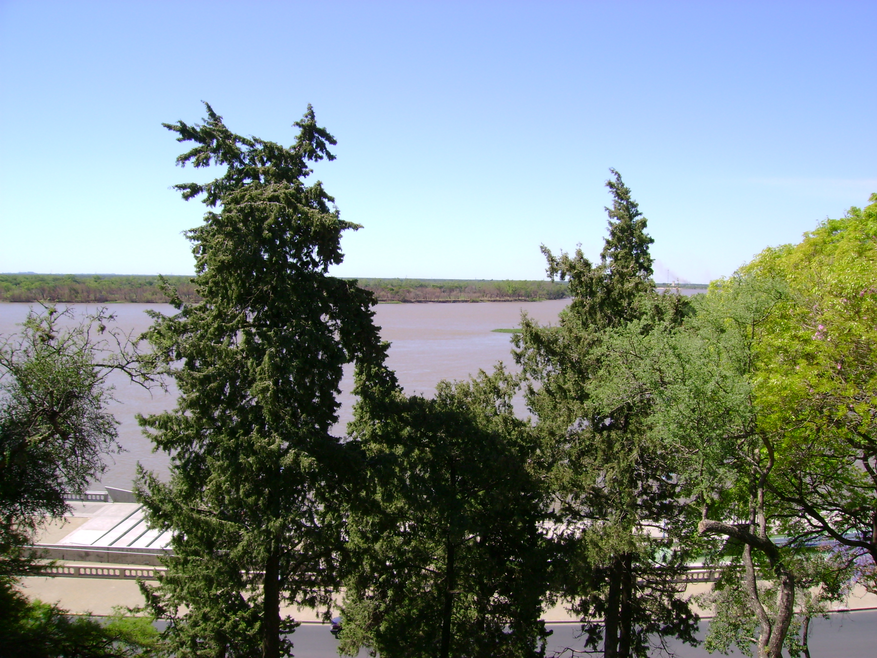 Vista del río desde el Parque Urquiza de la ciudad de Paraná, Entre Ríos Argentina/View of the river from the Urquiza Park in the city of Paraná, Entre Ríos Argentina.